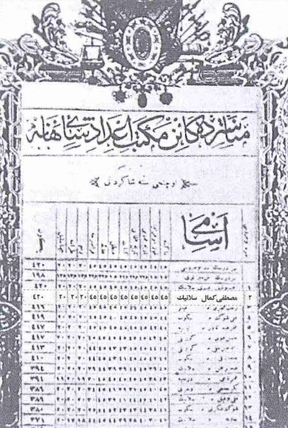 Mustafa Kemal Atatürk'ün Manastır Mekteb-i İdâdî-i Şâhânesi'nde üçüncü sınıf öğrencisi iken aldığı karne.